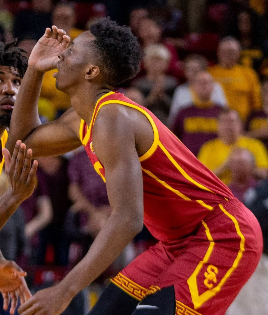 2020-02-08 ASU MBB vs. USC-4